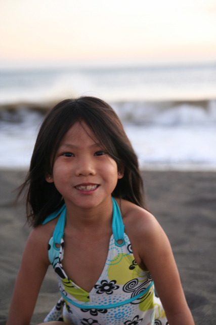 Costa Rica asian girl in Puntarenas.